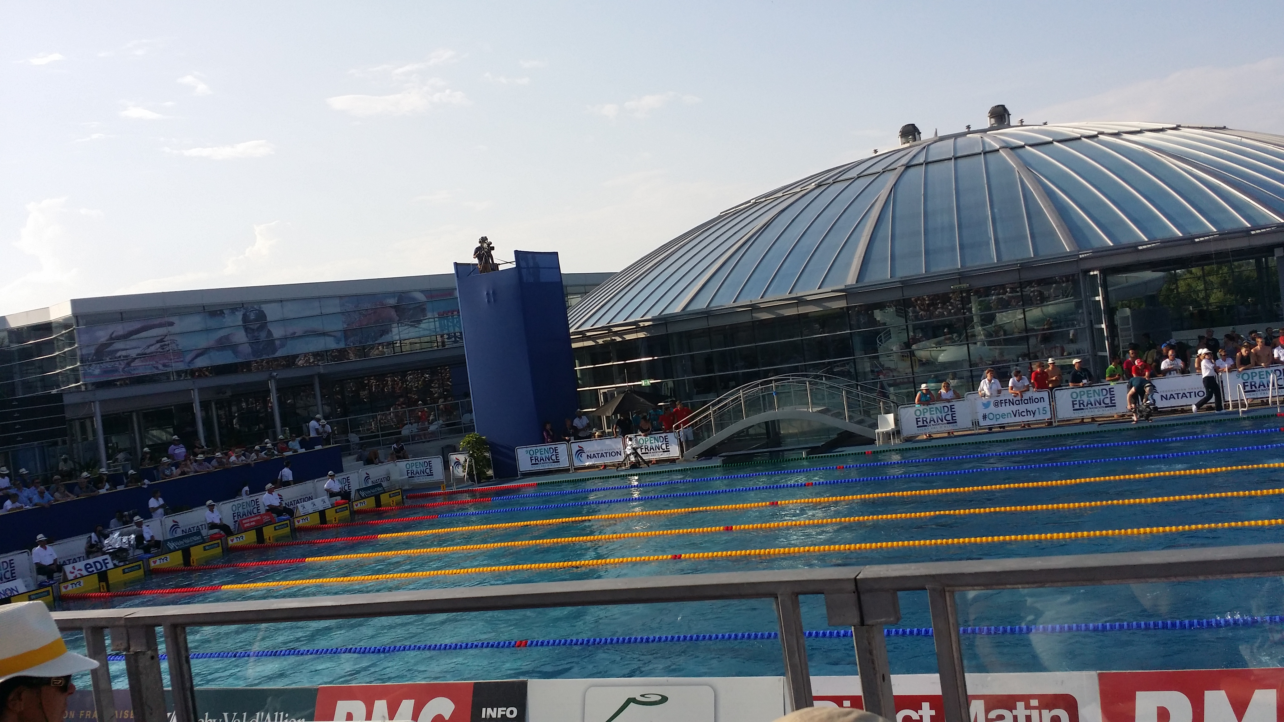 Photo prise à l'Open de France de natation